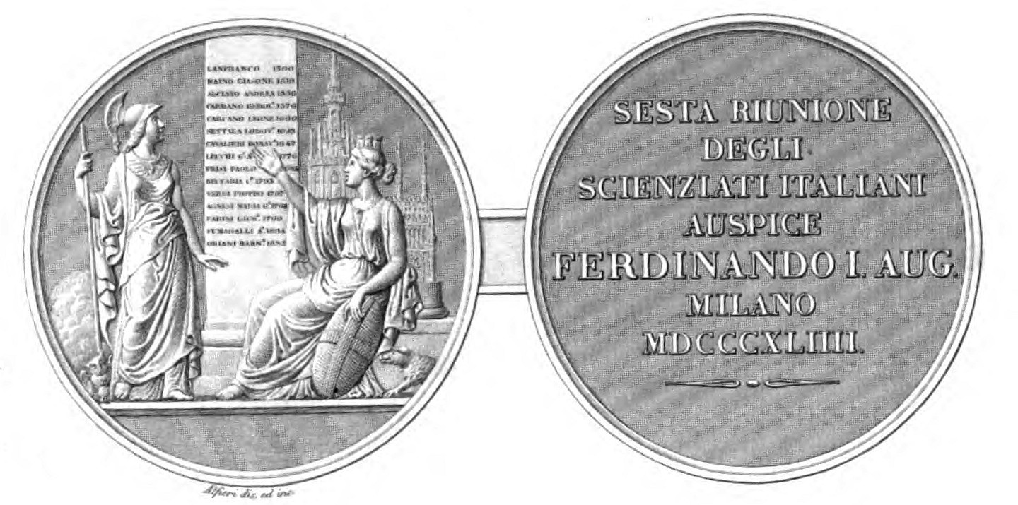 Medaglia per la sesta riunione degli scienziati italiani